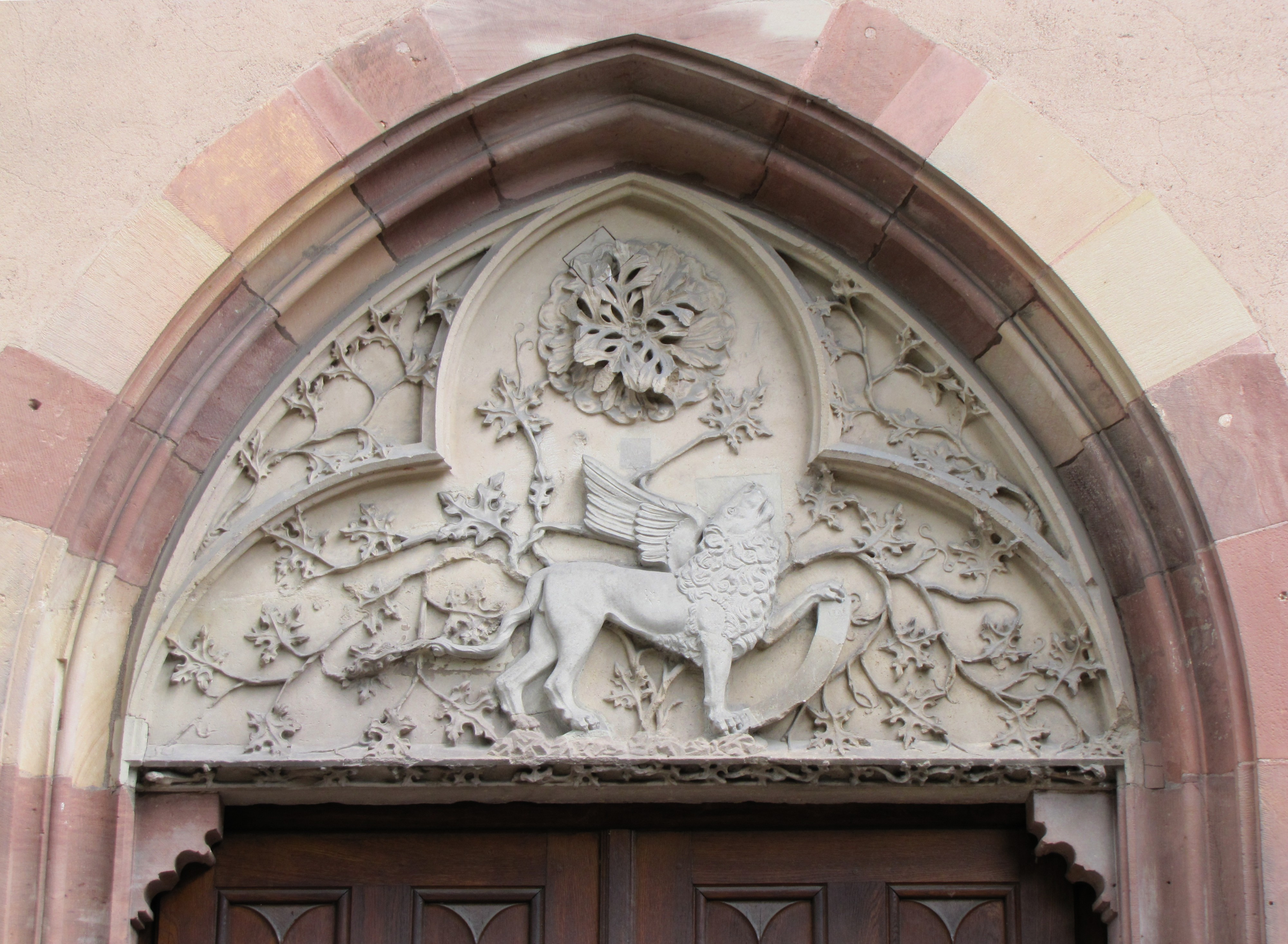 Alsace, Bas-Rhin, Église Saint-Jean de Strasbourg (PA00085027).Tympan d'un portail représentant le lion de St Marc, (ancien couvent St Marc).